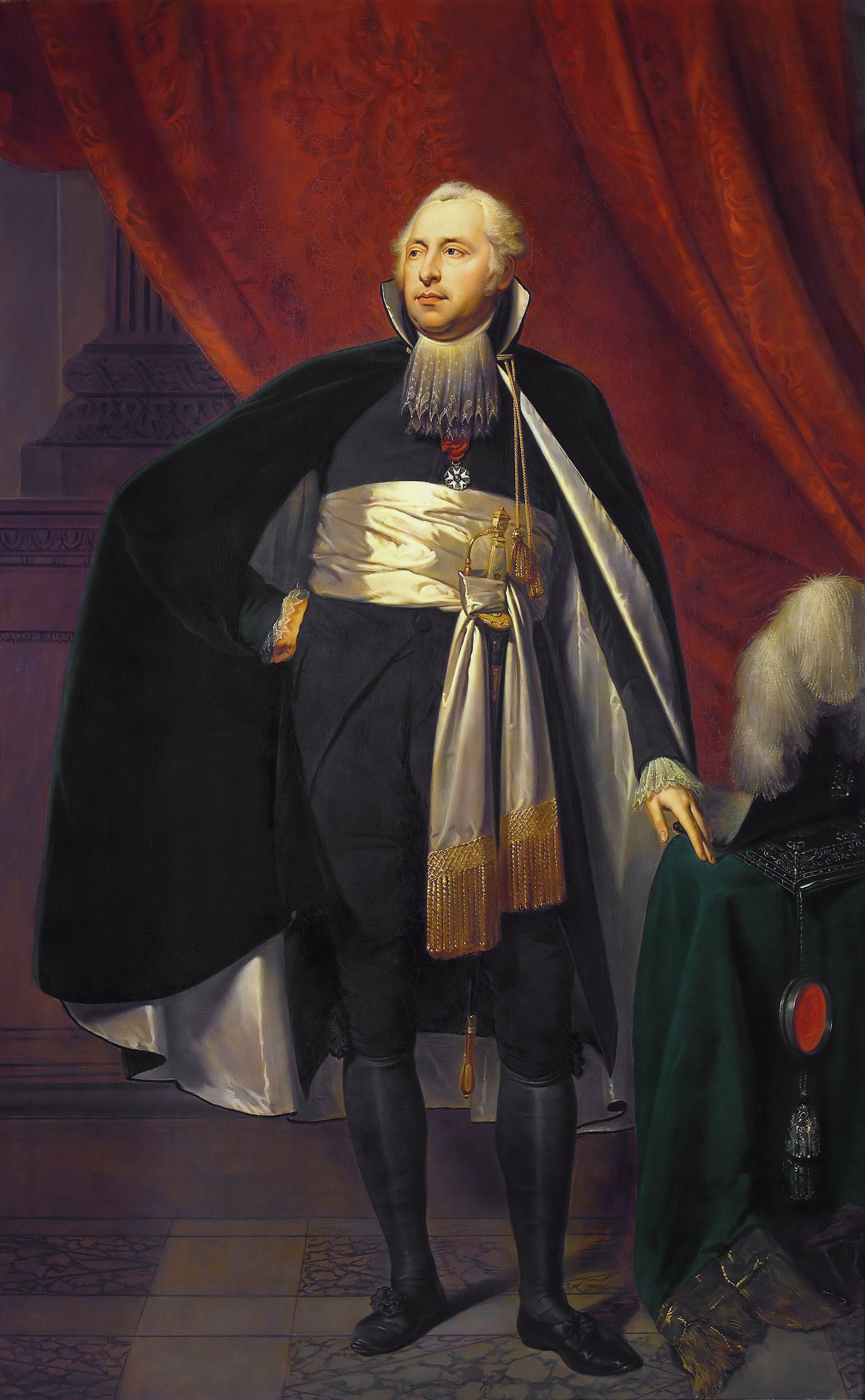 Portret van Rutger Jan Schimmelpenninck (1761-1825), Raadspensionaris van de Bataafse Republiek (1805-1806). Kasteel Nijenhuis, Diepenheim.